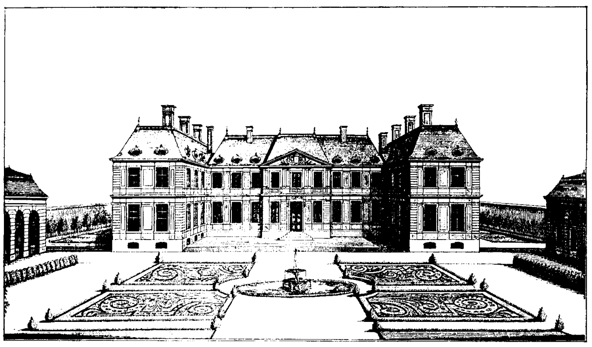 Façade du jardin de l'hôtel du grand prieur, facsimilierter Stich